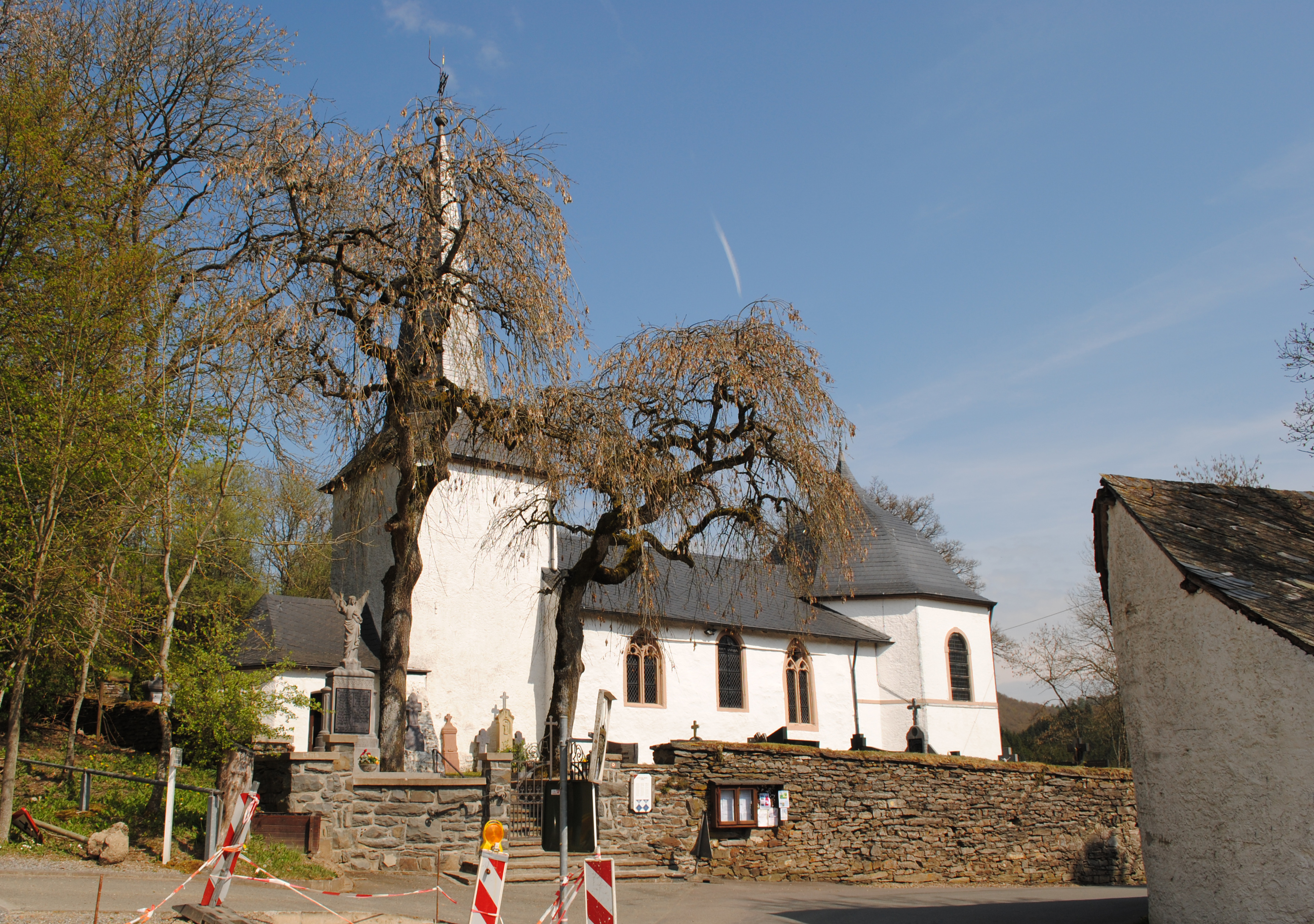 St. Peter, Ouren